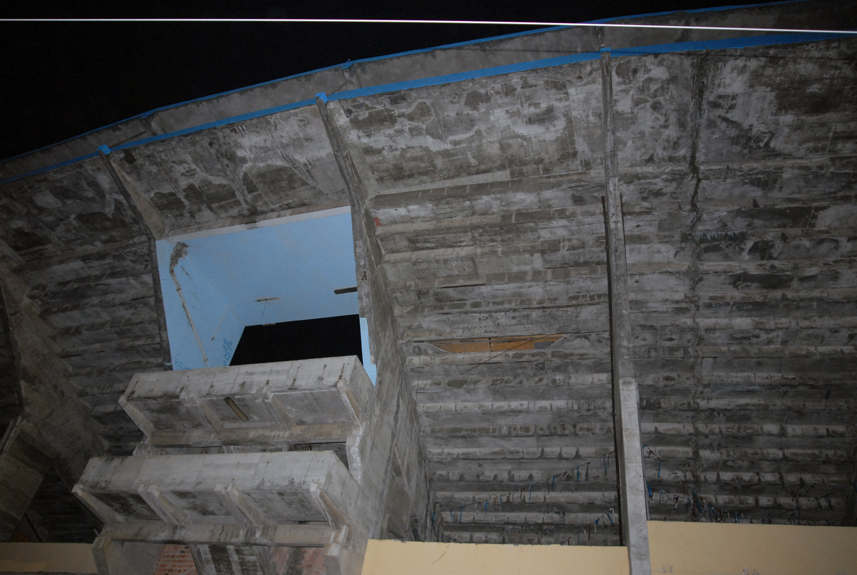 Salvador - Buraco da arquibancada do Estádio da Fonte Nova fechado com tábuas. No último domingo (25) parte da arquibancada do estádio cedeu e sete pessoas morreram.